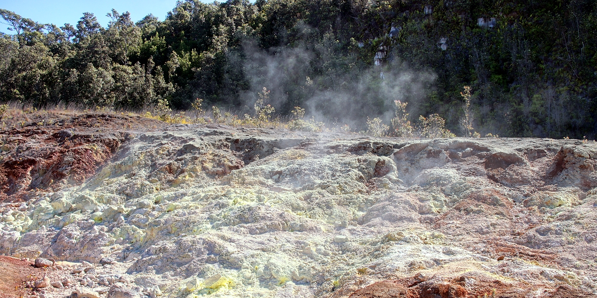 Иллюстрация для викиучебника Гавайеведение